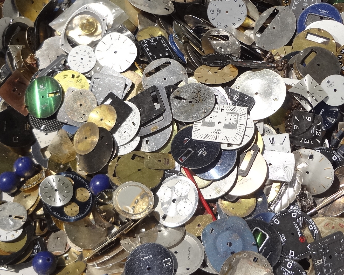 Cadrans de montres, principalement de la marque Tissot. Marché aux puces de Plainpalais.